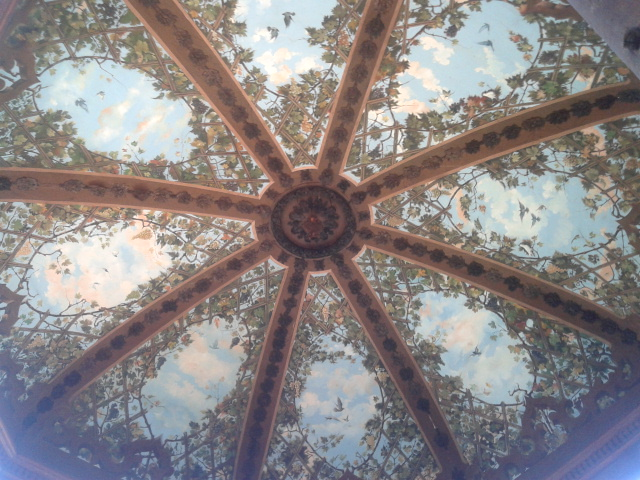 Volta affrescata da Pasquale Di Fabio